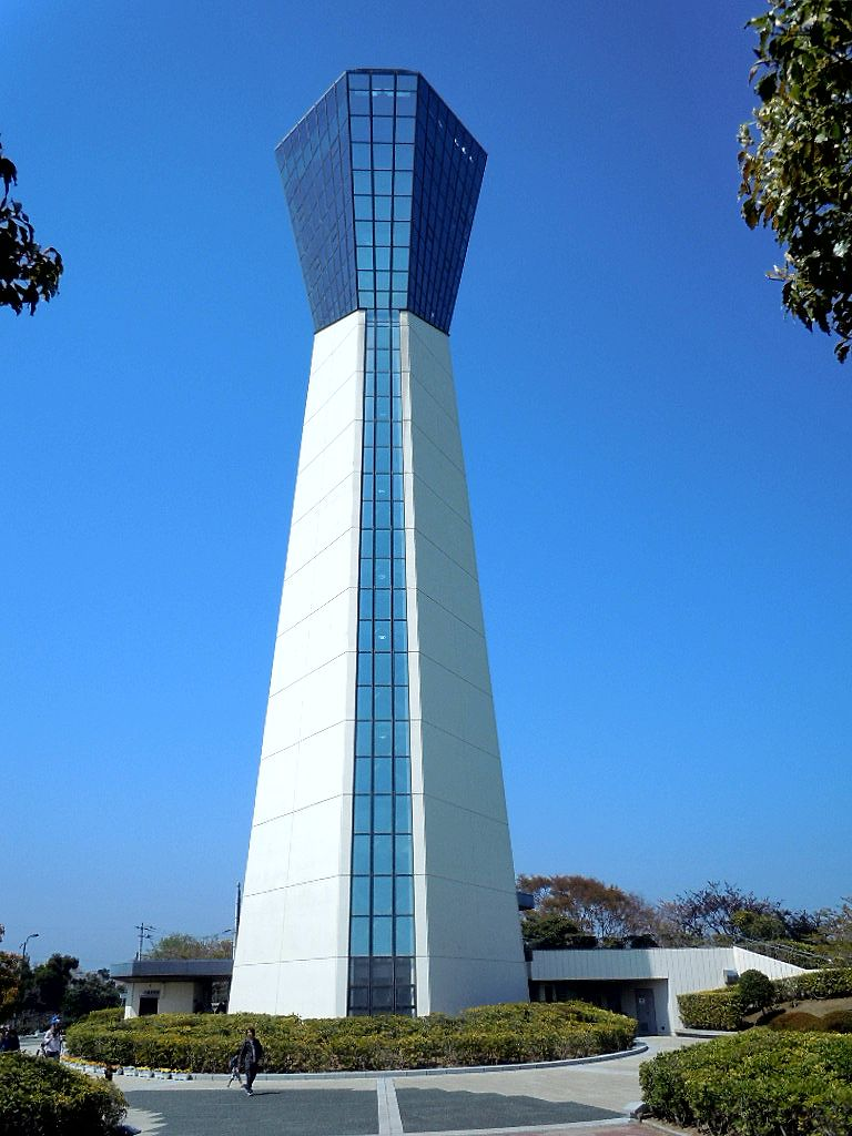 いわきマリンタワー全景